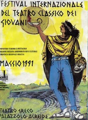 Locandina del primo Festival Internazionale del Teatro Classico dei Giovani di Palazzolo Acreide voluto da Giusto Monaco per favorire l'interesse dei giovani alla rappresentazione dei classici greci e latini, il festival avviene ogni anno con la partecipazione di circa 80 scuole di tutta europa